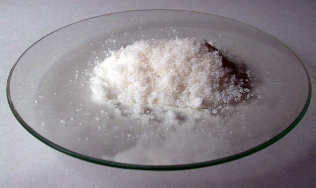 Barium nitrate Ba(NO3)2